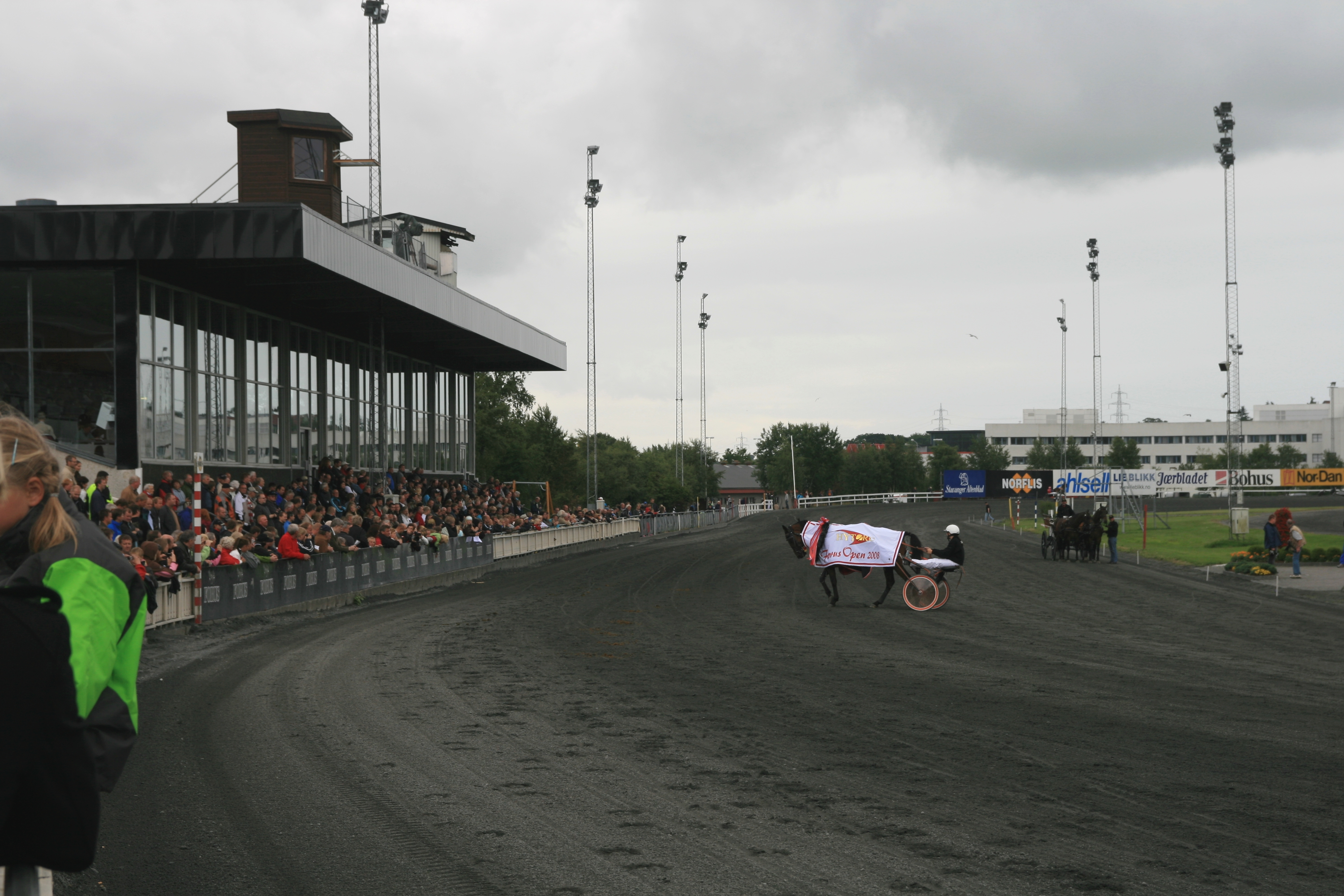 Forus travbane under Forus Open i Stavanger 2008